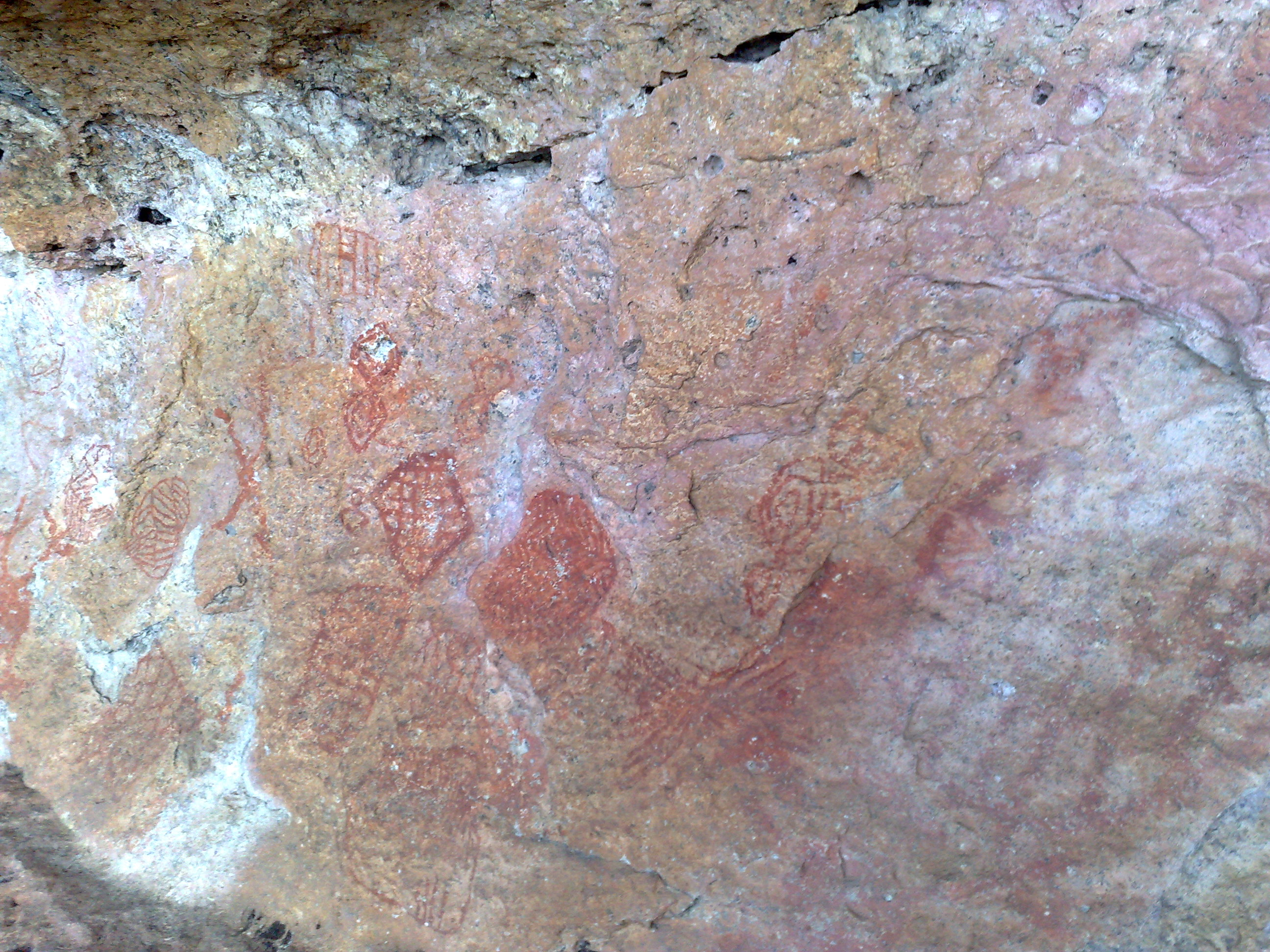 PETROGLIFOS en la Piedra Venado (Piaroa) o Piedra Pelón (Piapocos)